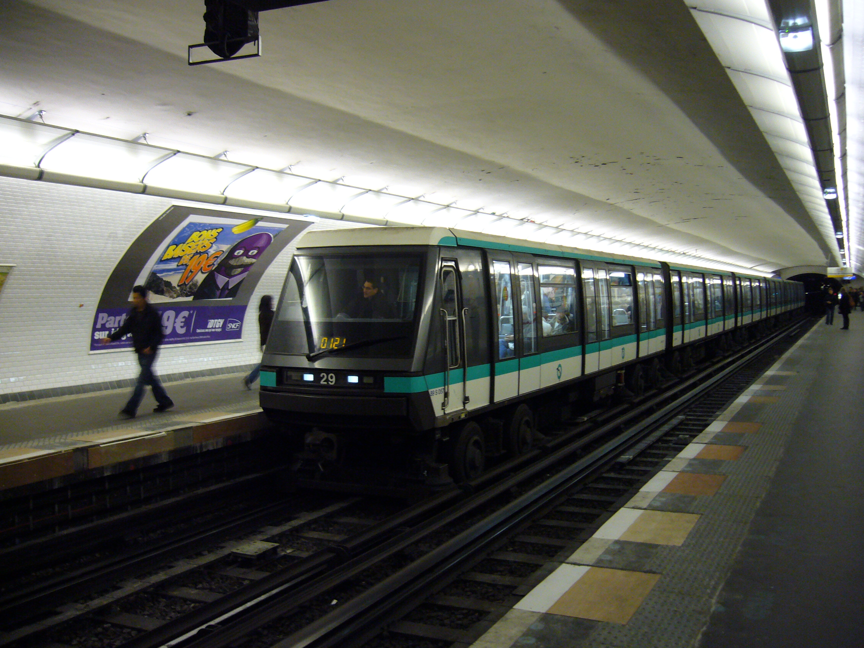 Un MP 89 à la station Les Sablons sur la ligne 1 du métro de Paris.